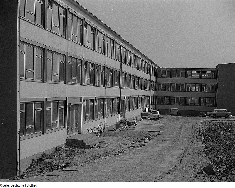 Original image description from the Deutsche FotothekDresden-Zschertnitz. Schulen 110. und 111. POS, später Theodor Körner und Gottfried Semper